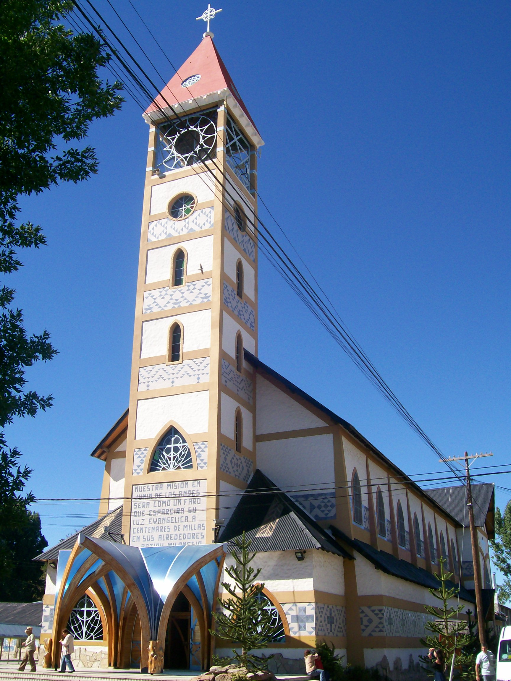 Catedral de Junín de los Andes.